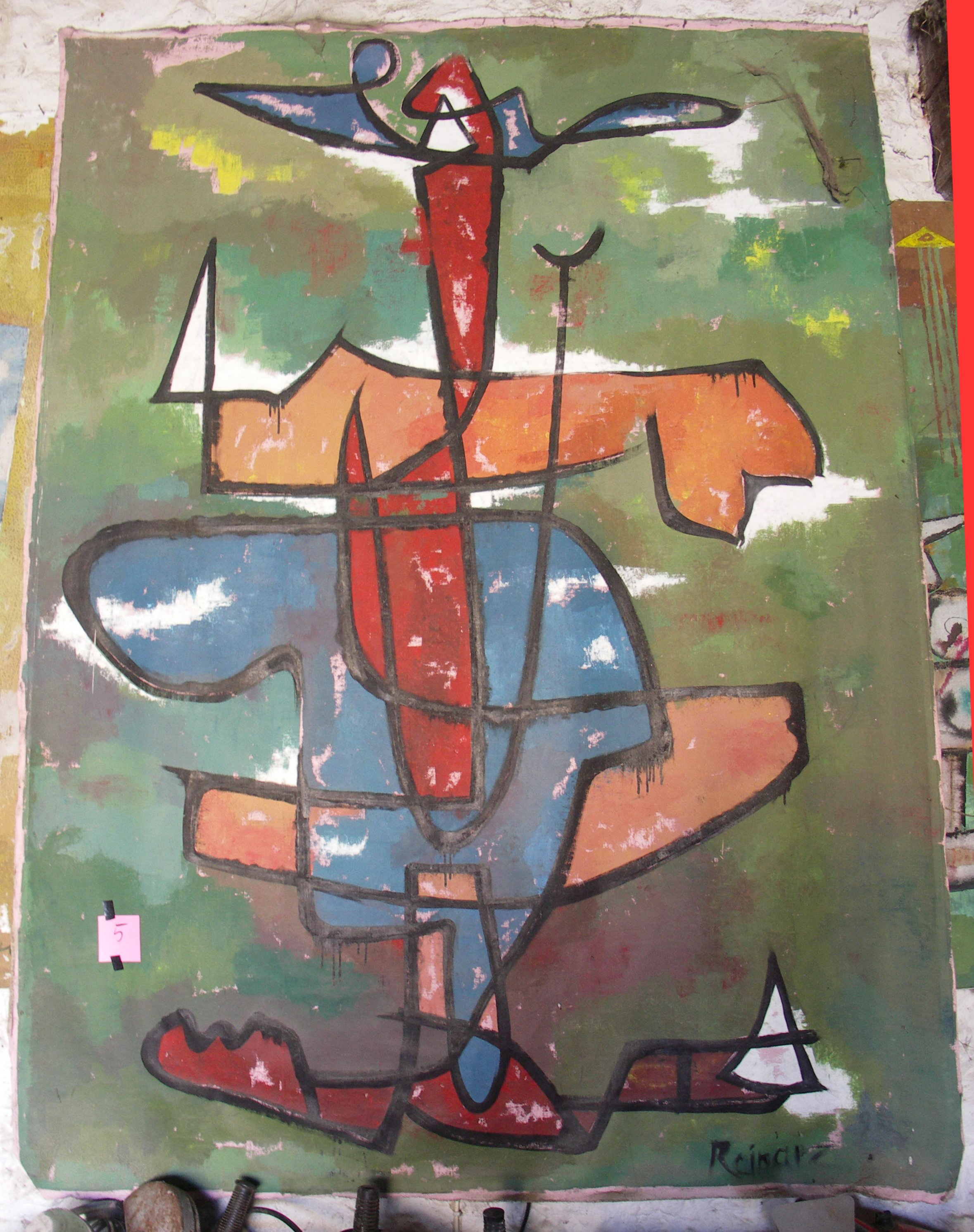 Ölgemälde, 200 x 120, Johannes Reinarz